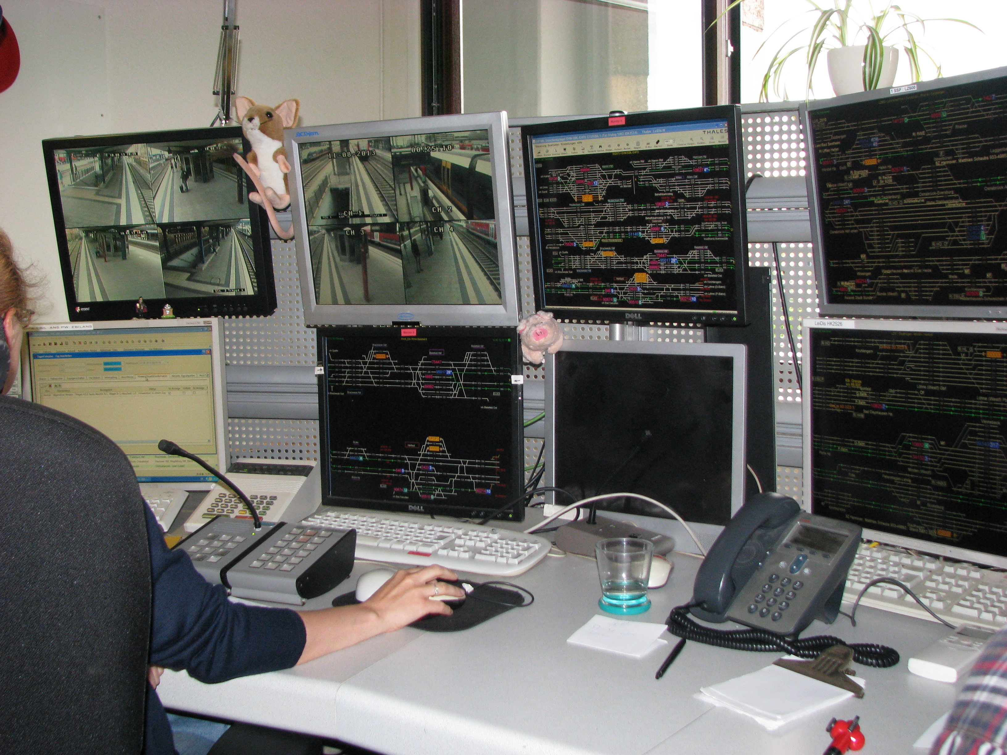 Arbeitsplatz der Zugansage im Bielefelder Hauptbahnhof. Zu den Aufgaben gehört zusätzlich die Videoüberwachung der Bahnsteige sowie die Alarmierung und Koordination in Notfällen.